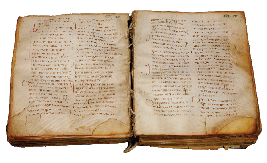 შატბერდის კრებული